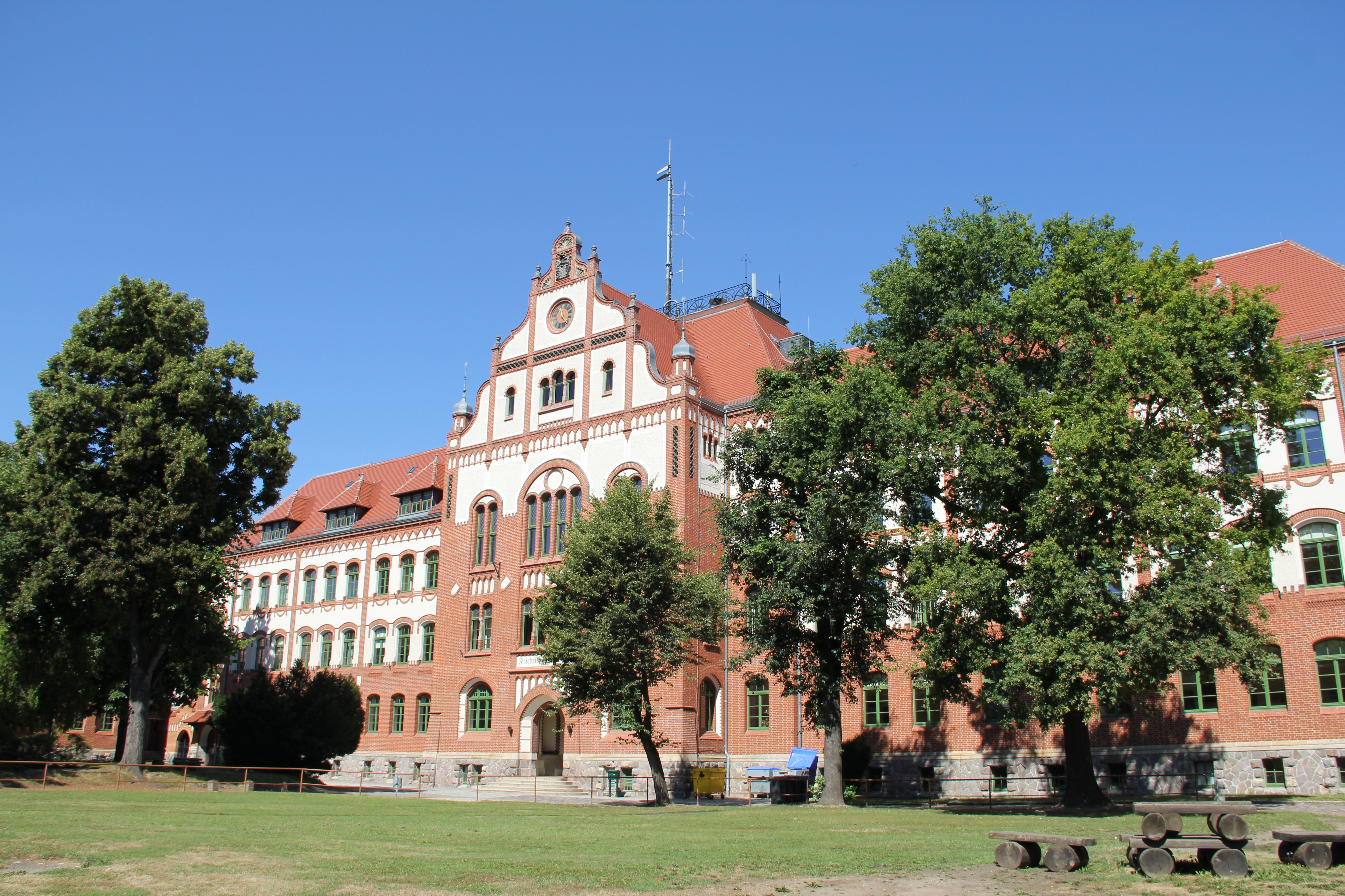 Friedrichgymnasium Altenburg